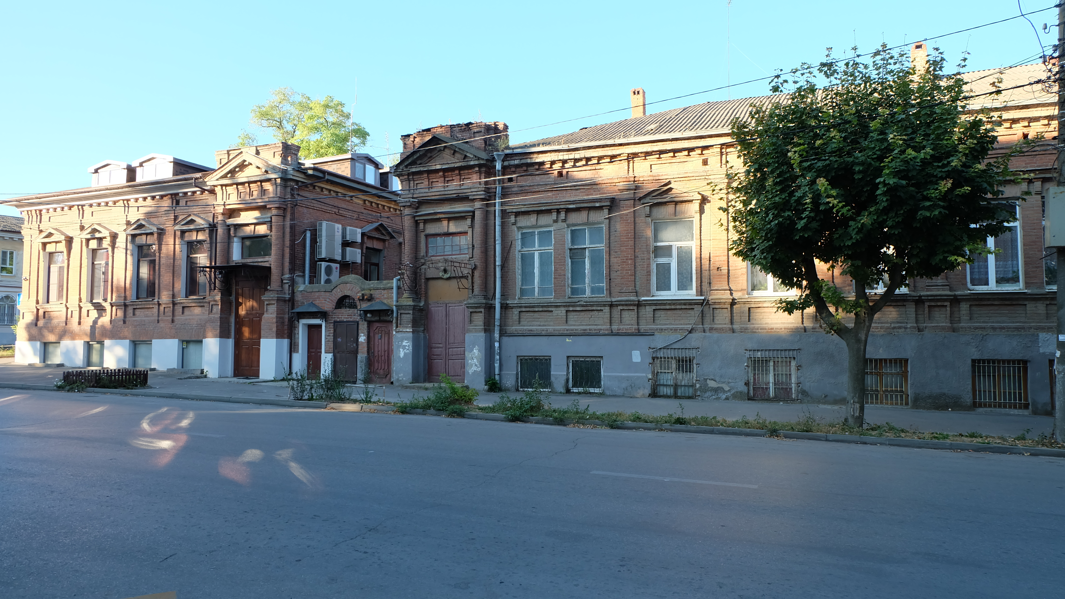 Жилой дом, комплекс застройки улицы: улица Греческая, 61, Таганрог, Ростовская область